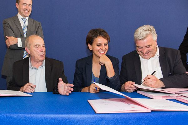 Signature du plan pour la mixité et l'égalité professionnelle dans le transport maritime, juillet 2014 : Eric BANEL, Directeur Général d'Armateurs de France, Patrice Huart, président de l'OPCA transports, Najat Vallaud-Belkacem, Ministre du droit des femmes, Frédéric Cuvillier, Secrétaire d'Etat aux transports et à la mer